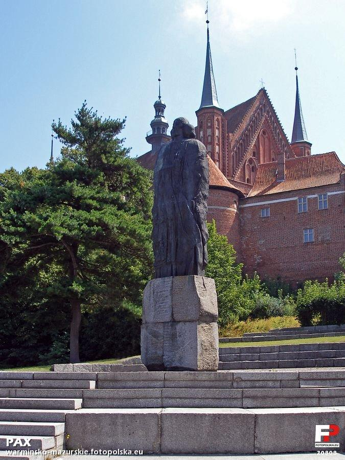 Pomnik Mikołaja Kopernika w centrum miejscowości.